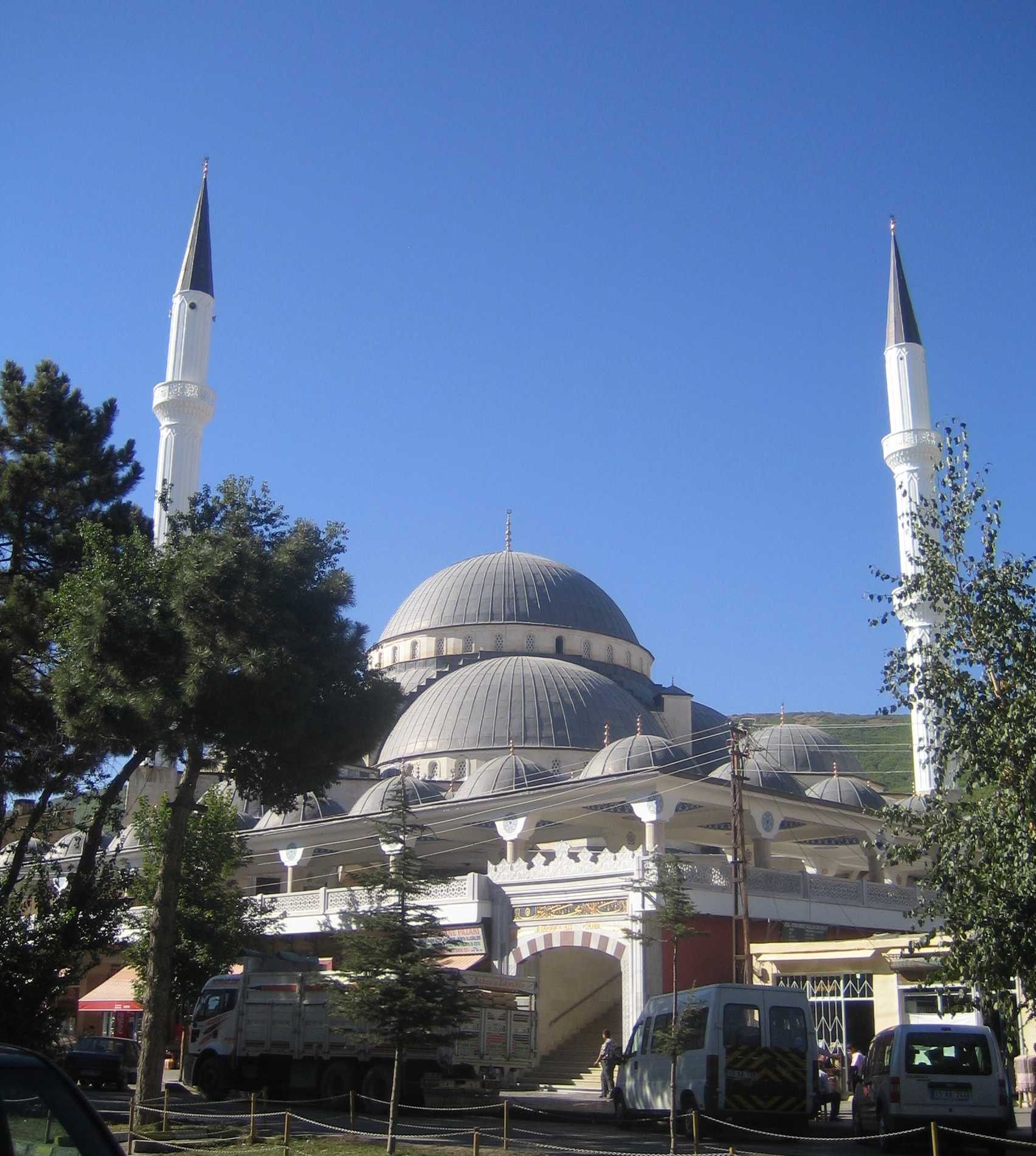 İbadullah Camii in Tatvan, Turkey